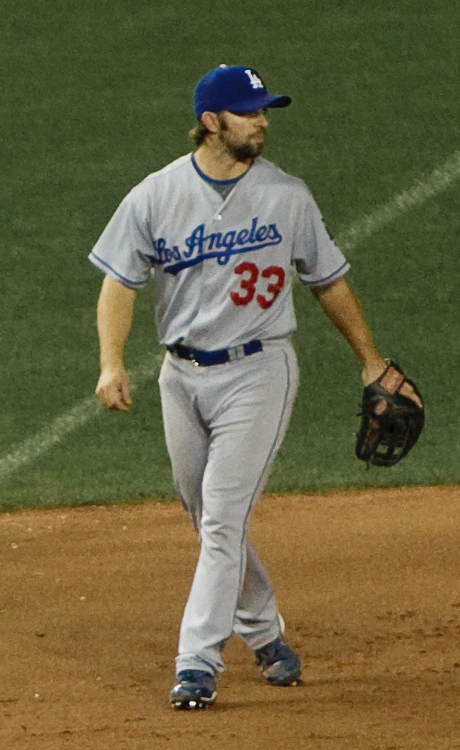 Blake DeWitt